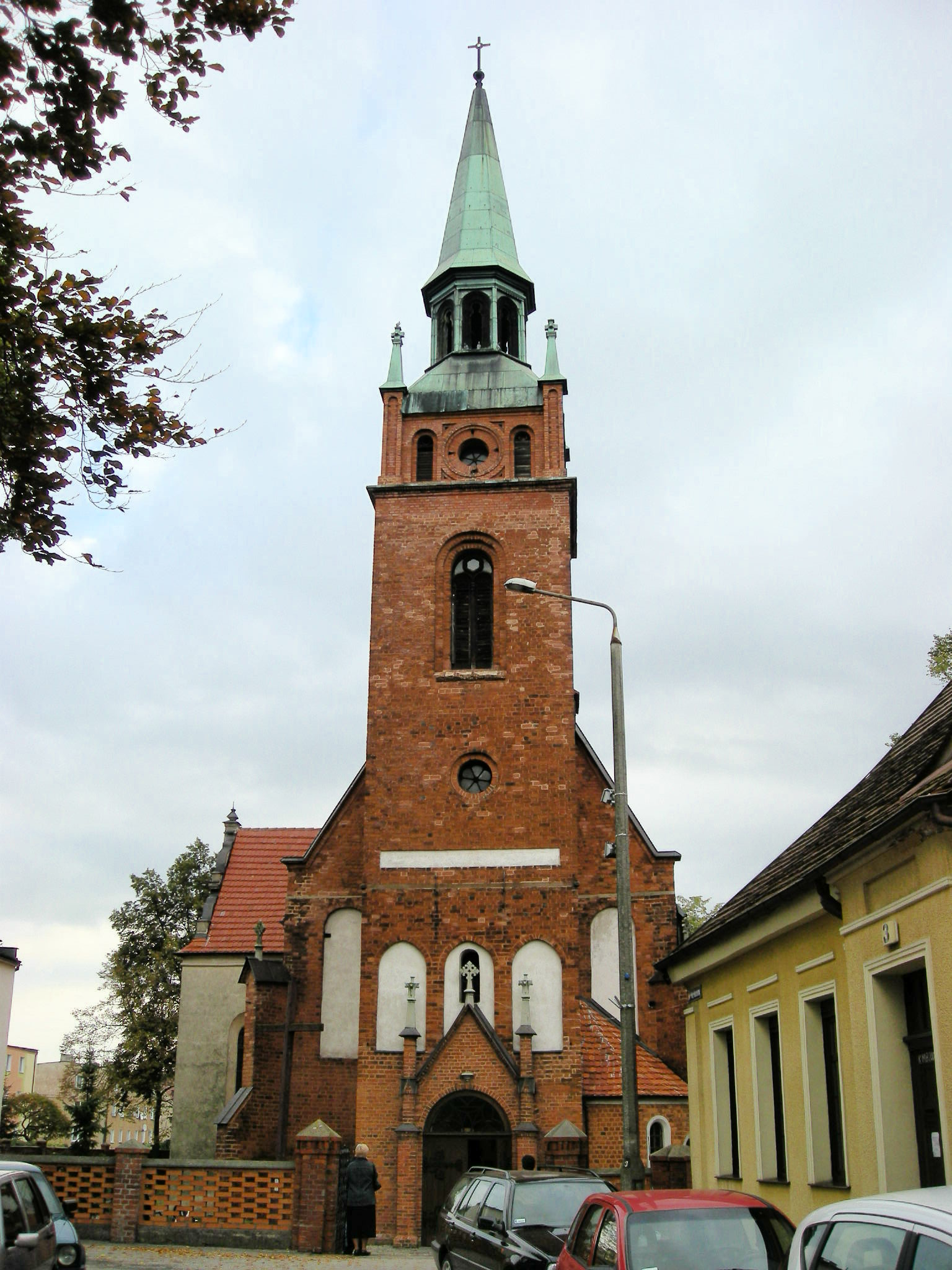 Szubin - kościół parafialny pw. św. Marcina, XIV, XIX w. (zabytek nr A/311 z 10.03.1933)